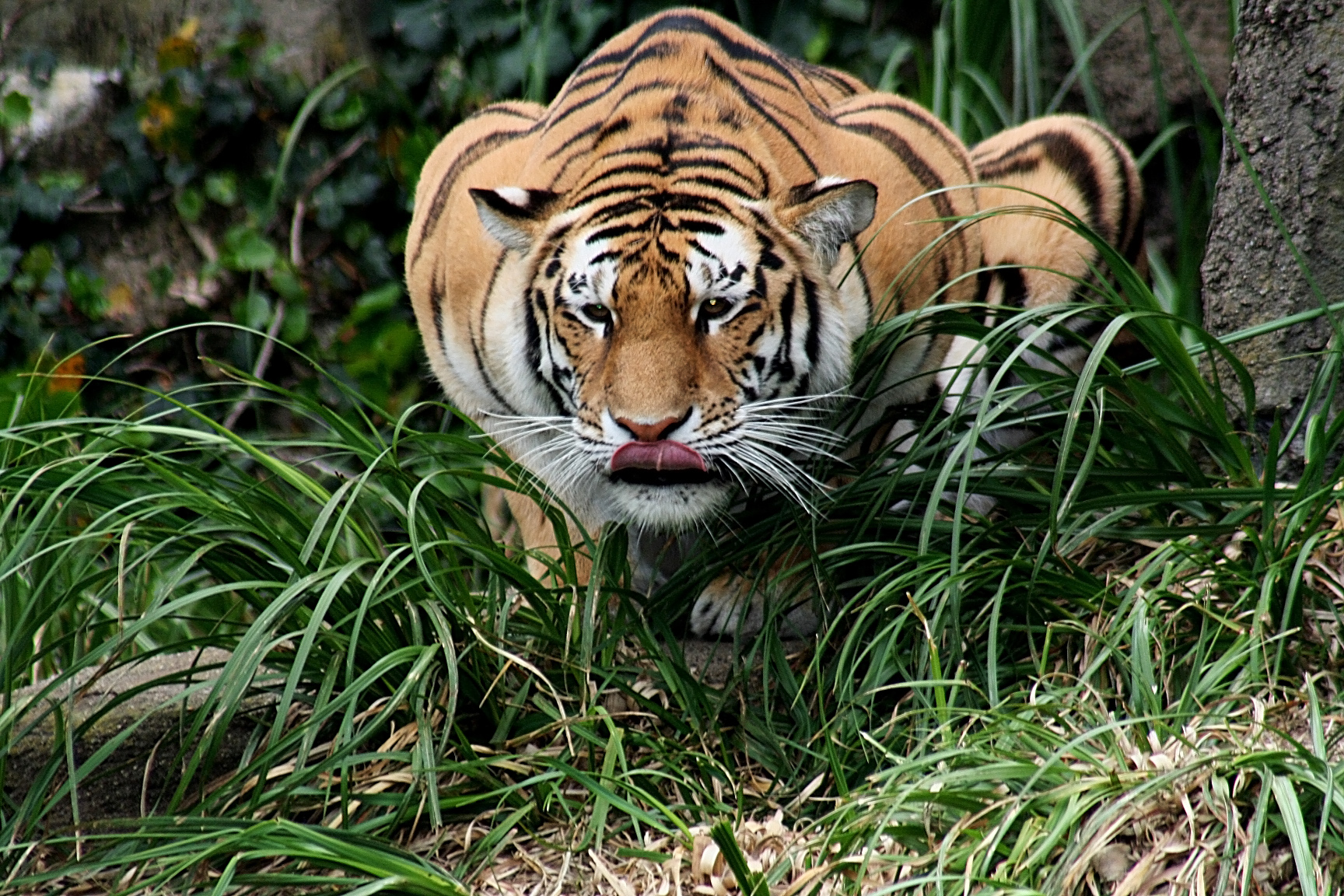 Hunting Tiger